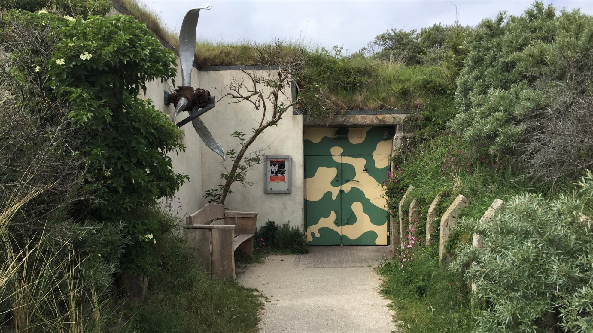 Bunkermuseum Schlei, Schiermonnikoog